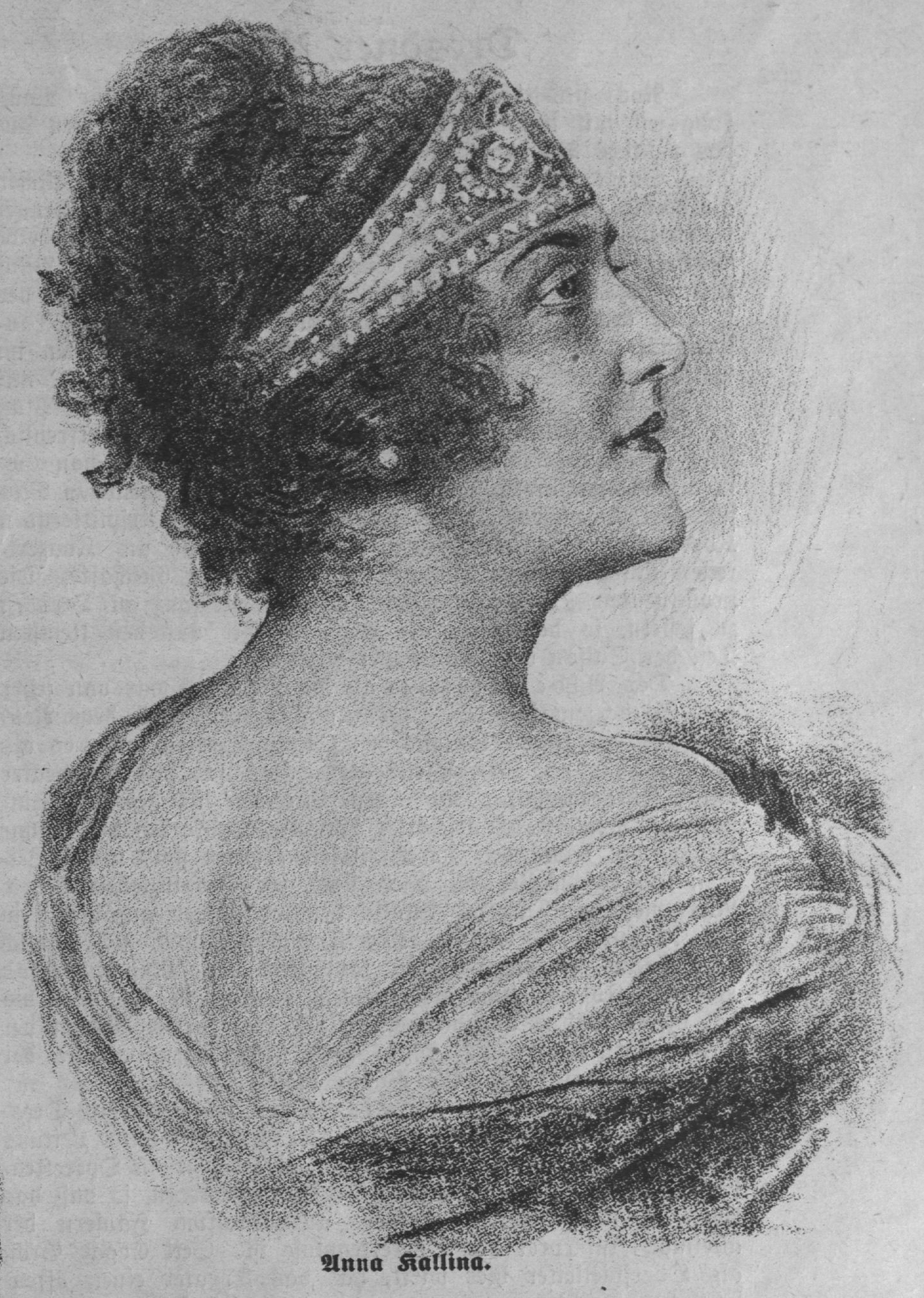 Anna KallinaAnna Kallina (1874–1954), Austrian actress